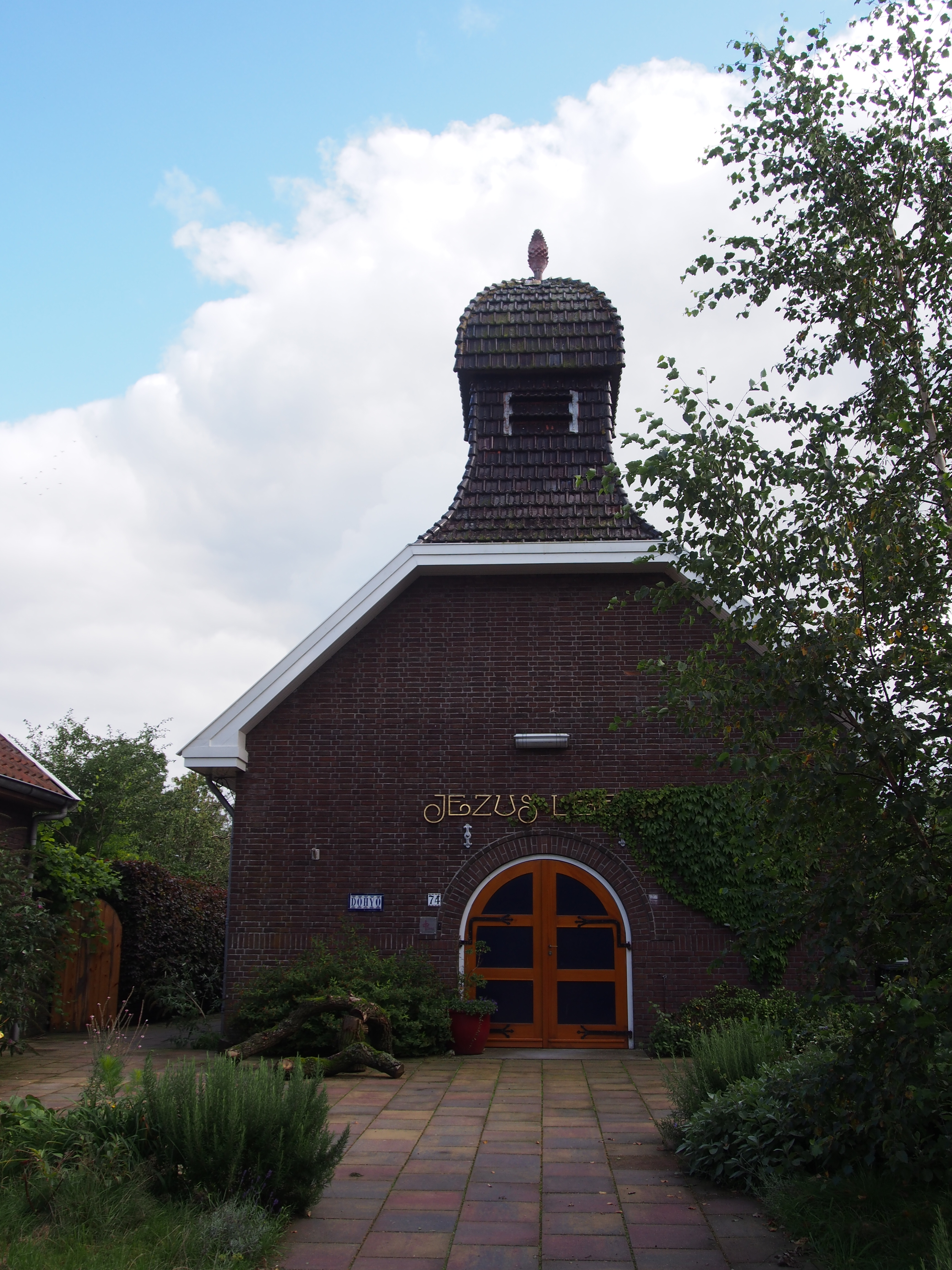 Jezus leeft kerkje (Luchtenveld, Drachtstercompagnie)